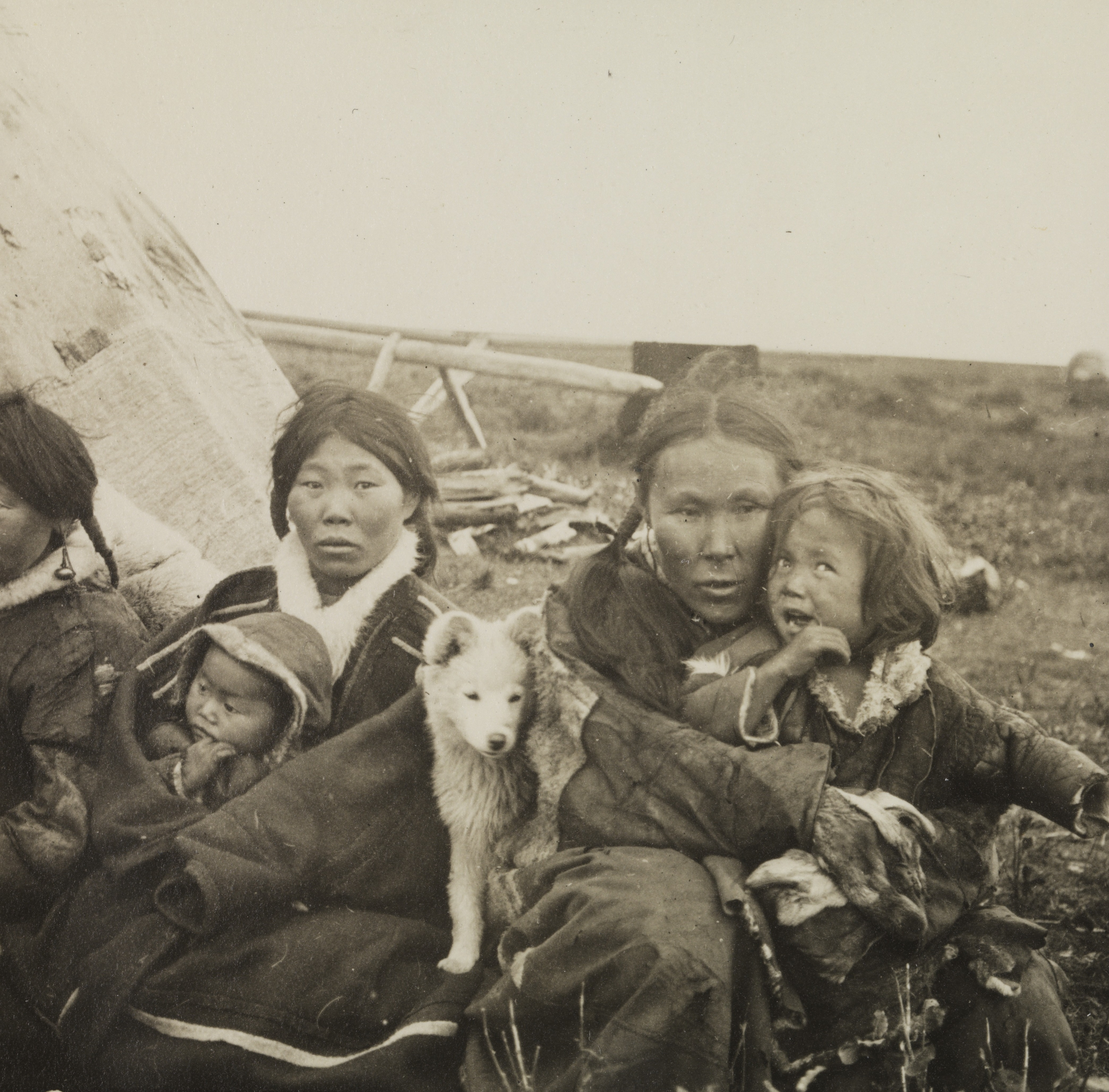 Nentse (entse) (folkegruppe) kvinner og barn med en hundehvalp foran teltet sitt. Ett av bildene fra reisen til Sibir i perioden 2. august-26. oktober 1913. Fridtjof Nansen startet sin transsibirske reise med et handelsskip fra Oslo til Jenisej. Ferden gikk gjennom deler av nordøstpassasjen som skulle åpne for en kortere handelsforbindelse mellom Vest Europa og Det Fjerne Østen. Depicted place: Russia